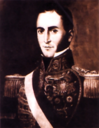 Luis José de Orbegoso y Moncada (1795 - 1847). Militar y político peruano. Presidente Constitucional del Perú de 1833 a 1836